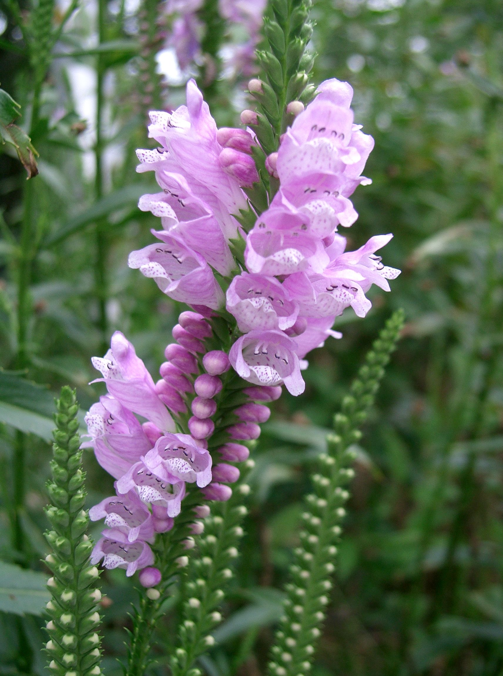 Physostegia virginiana